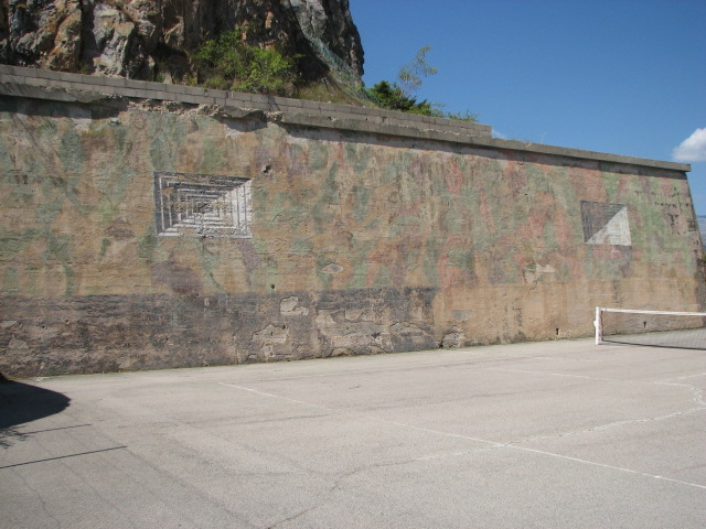 Mur d'escarpe Nord de l'ouvrage de Rimplas (Alpes-Maritimes) avec faux créneaux peints selon deux modèles différents (le terrain de tennis n'est pas d'époque).